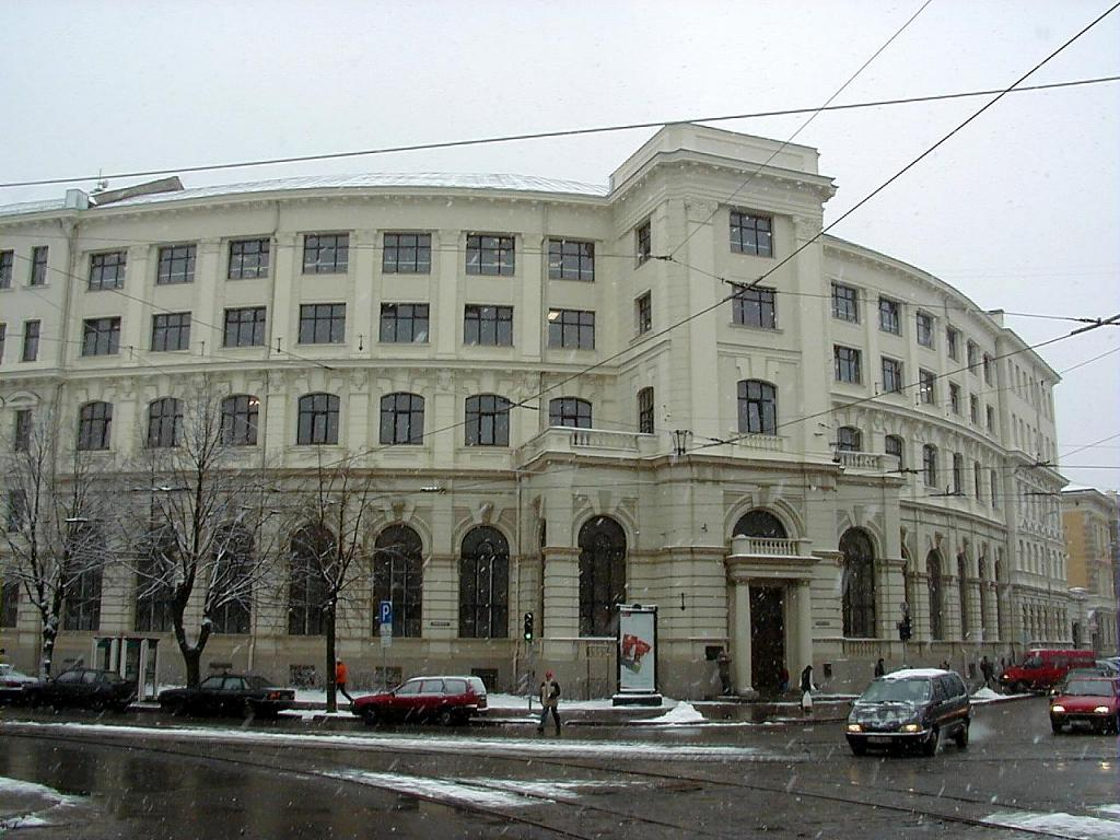 Rīga, LU Ekonomikas un vadības fakultāte 2002-11-08